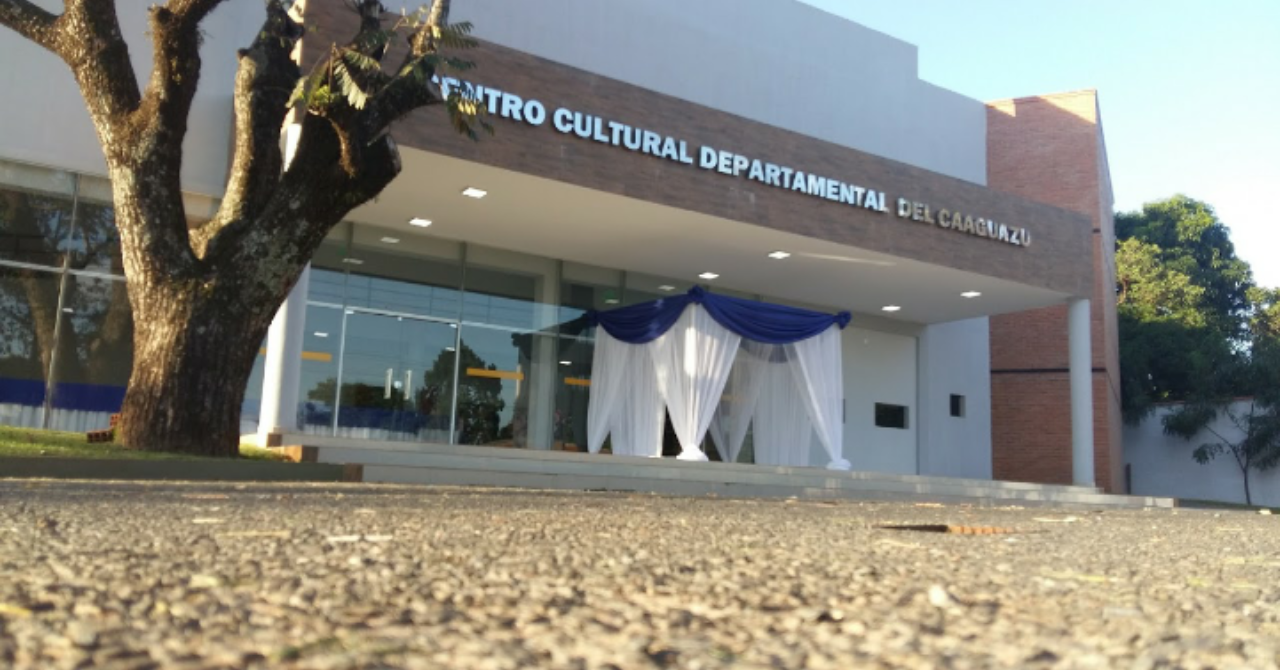 Centro Cultural de Caaguazu, uno de los más modernos del país.